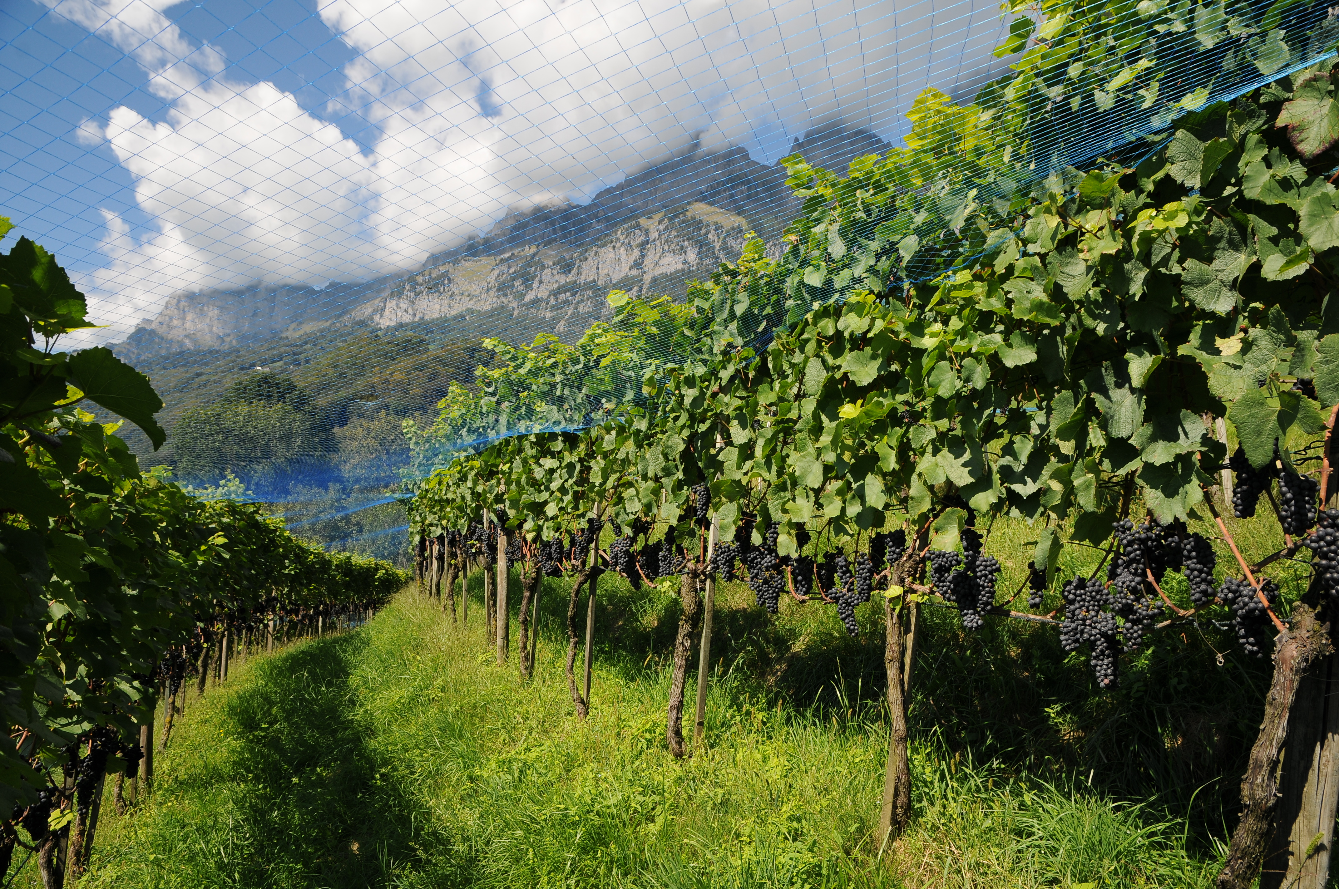 Weinanbau am Südhang auf der Parzelle Berg in Walenstadt.